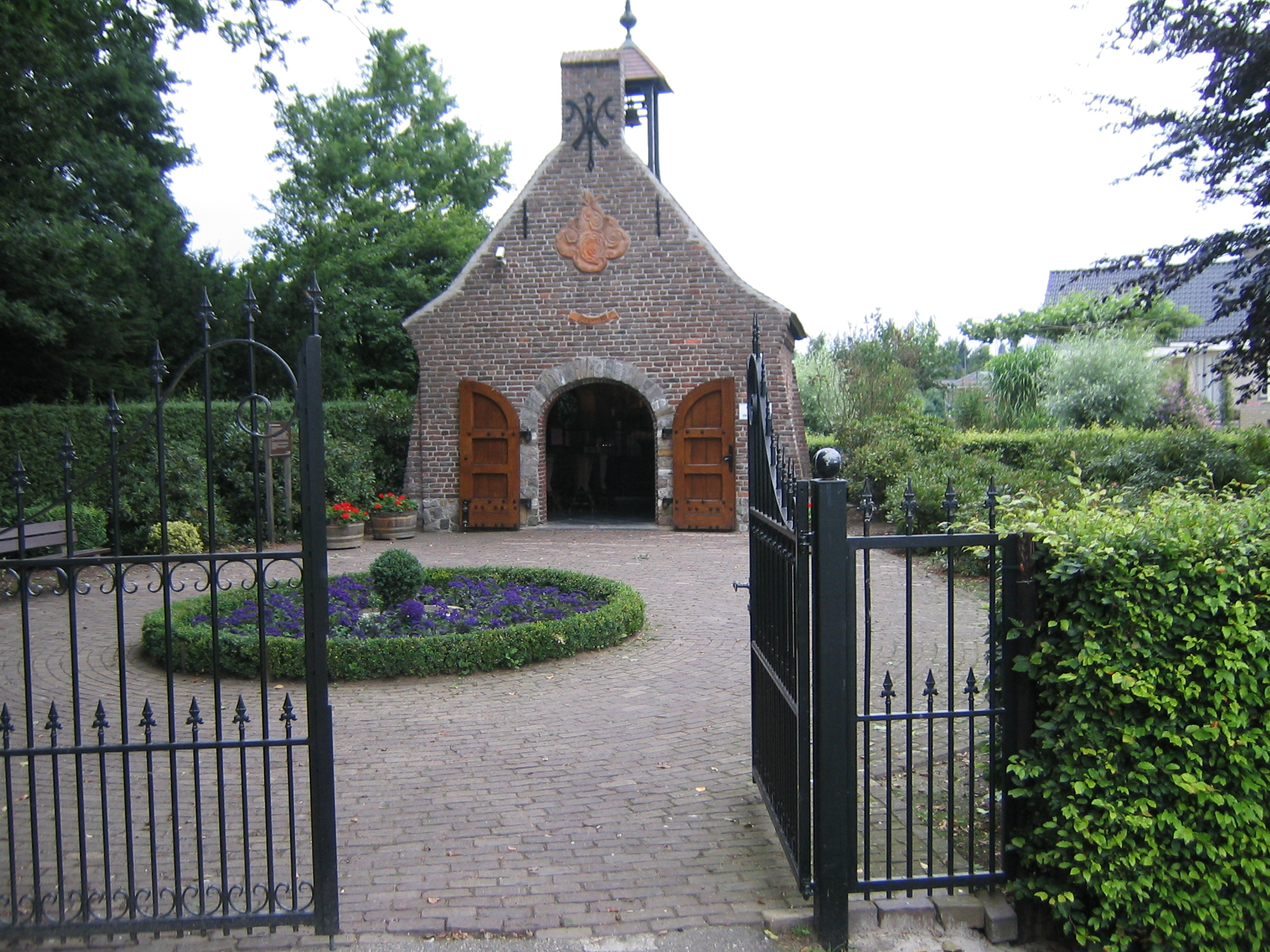 Foto zelf gemaakt op 23 juli 2005. Keunen